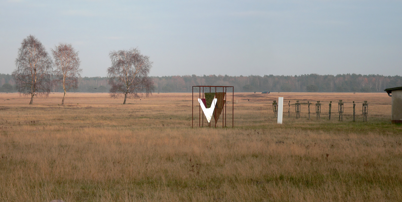 Camp Reinsehlen mit Kunstwerken